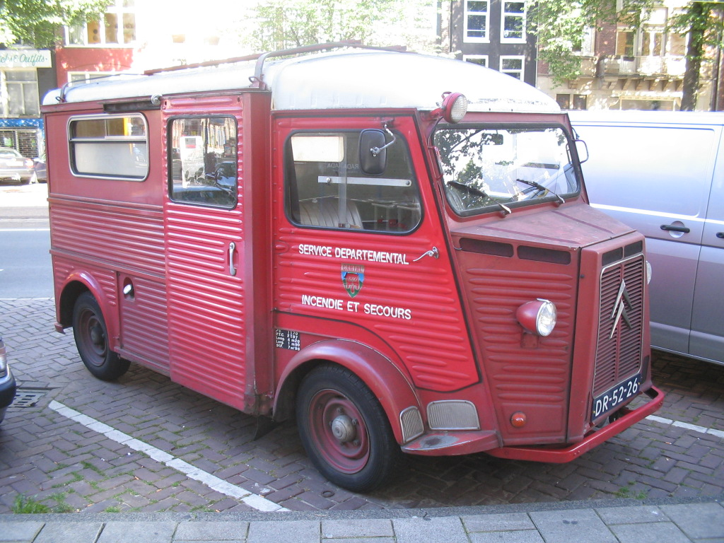 Citroën HY busje in Amsterdam